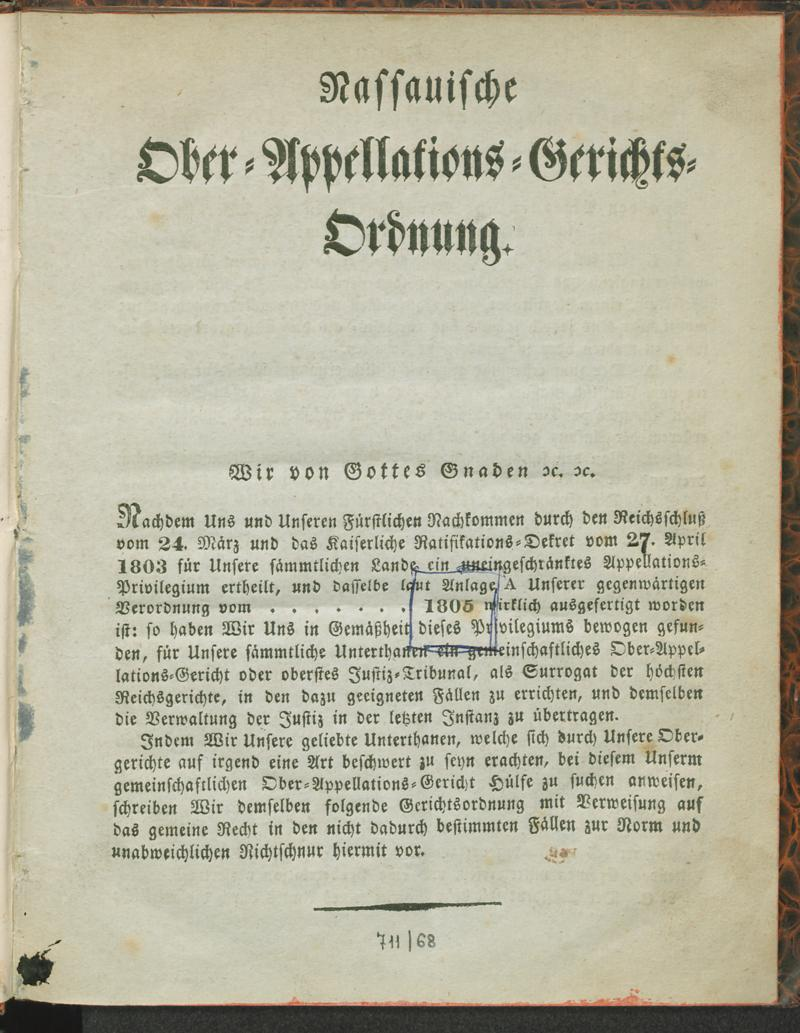 Deckblatt der gemeinsamen Nassauischen Ober-Appellations-Gerichtsordnung von 1805 der Häuser Oranien-Nassau sowie Nassau-Usingen und Nassau-Weilburg